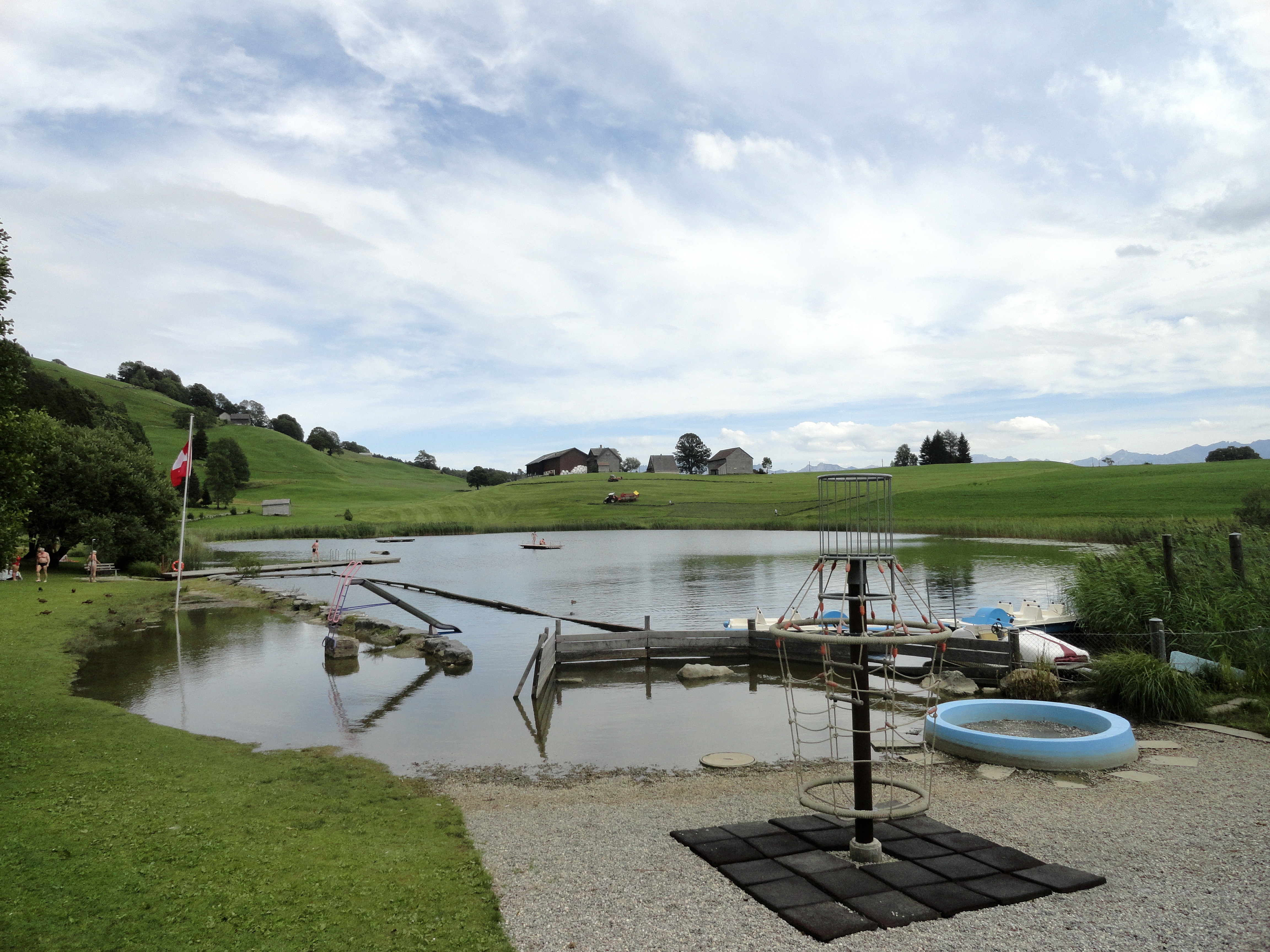 Schönenbodensee: Blick nach Osten